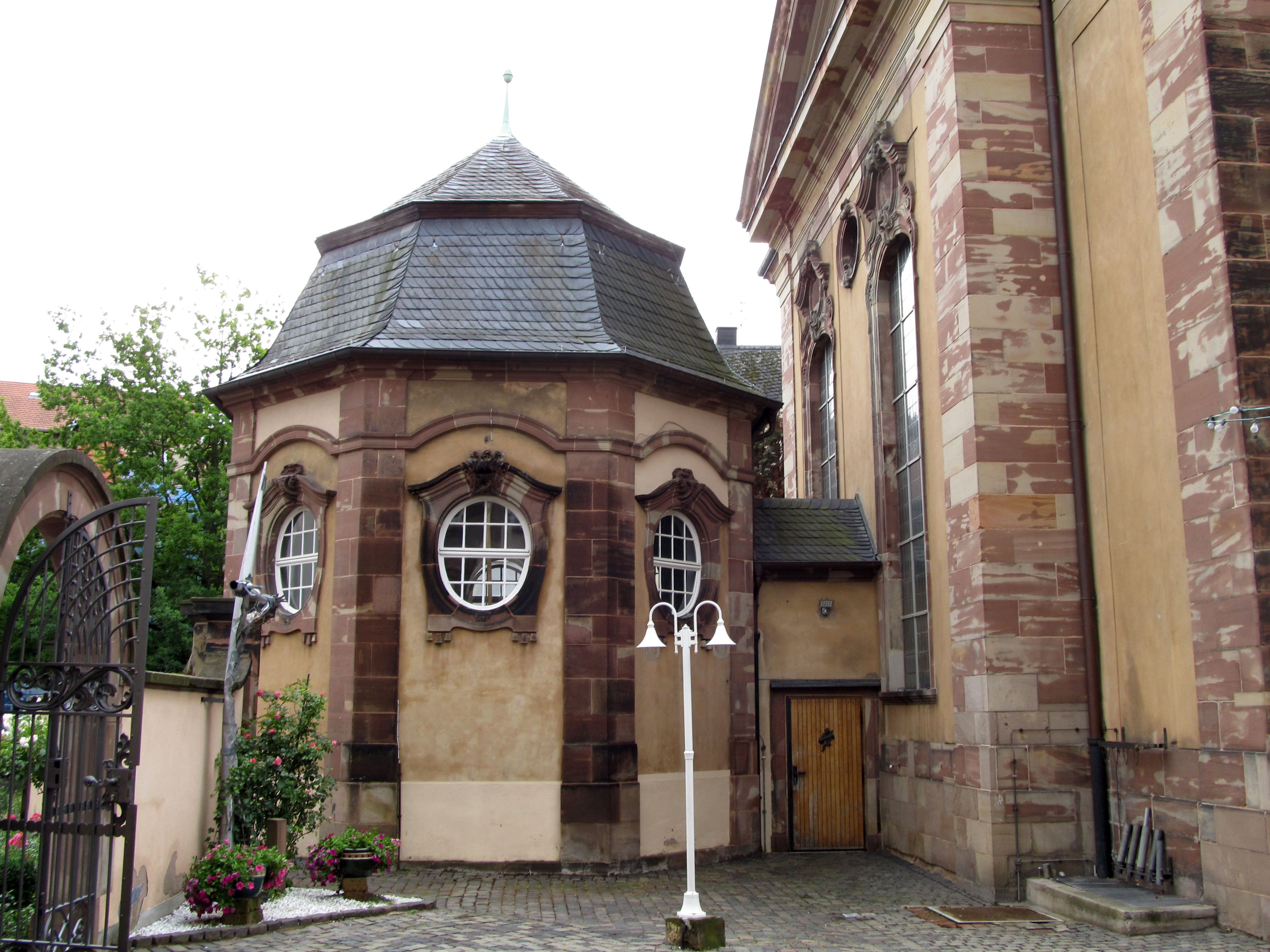 Sakristei der Basilika St. Johann in Saarbrücken, Saarland